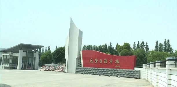 南京军区临汾旅大门。